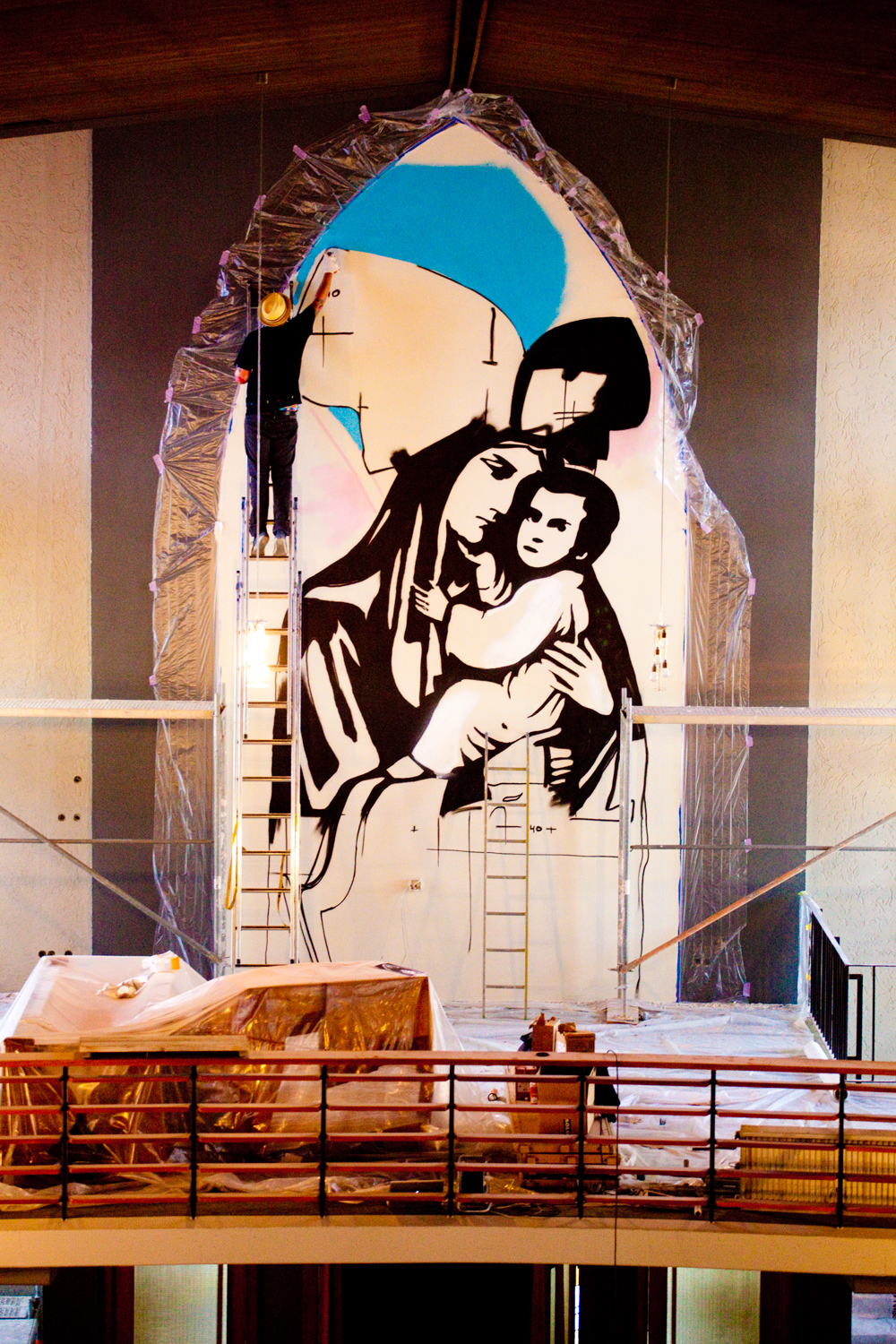 Die Madonna in der Kirche "Maria, Hilfe der Christen" des Ortes Goldscheuer